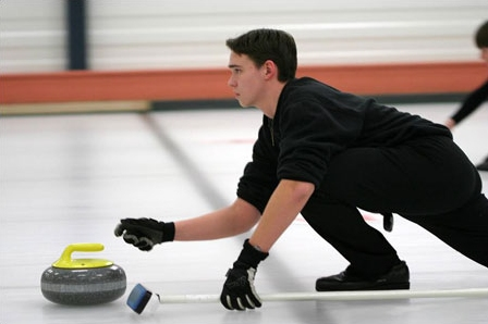 Rikku Pakkala